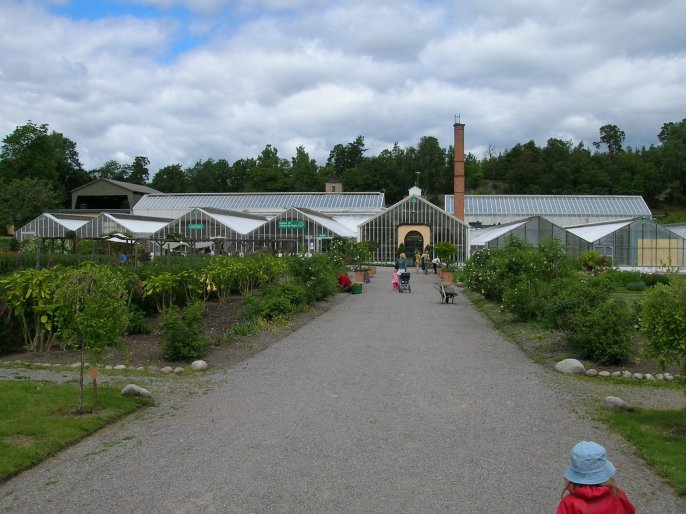 Butterflies at Fjärilshuset, Solna, Sweden.